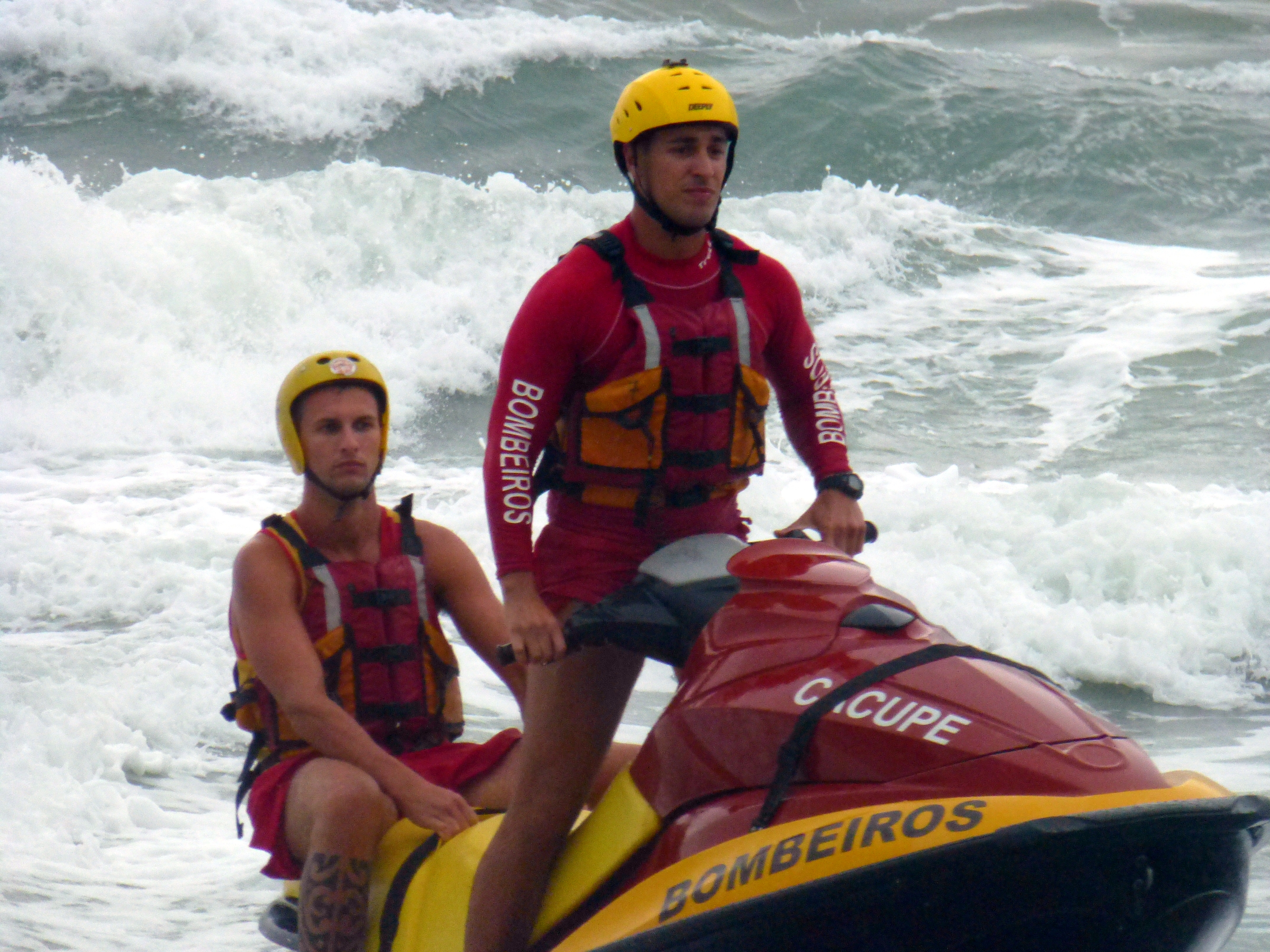 Salvavidas del Cuerpo de Bomberos Militar de Santa Catarina patrullando las aguas de Praia Brava, en Florianópolis.